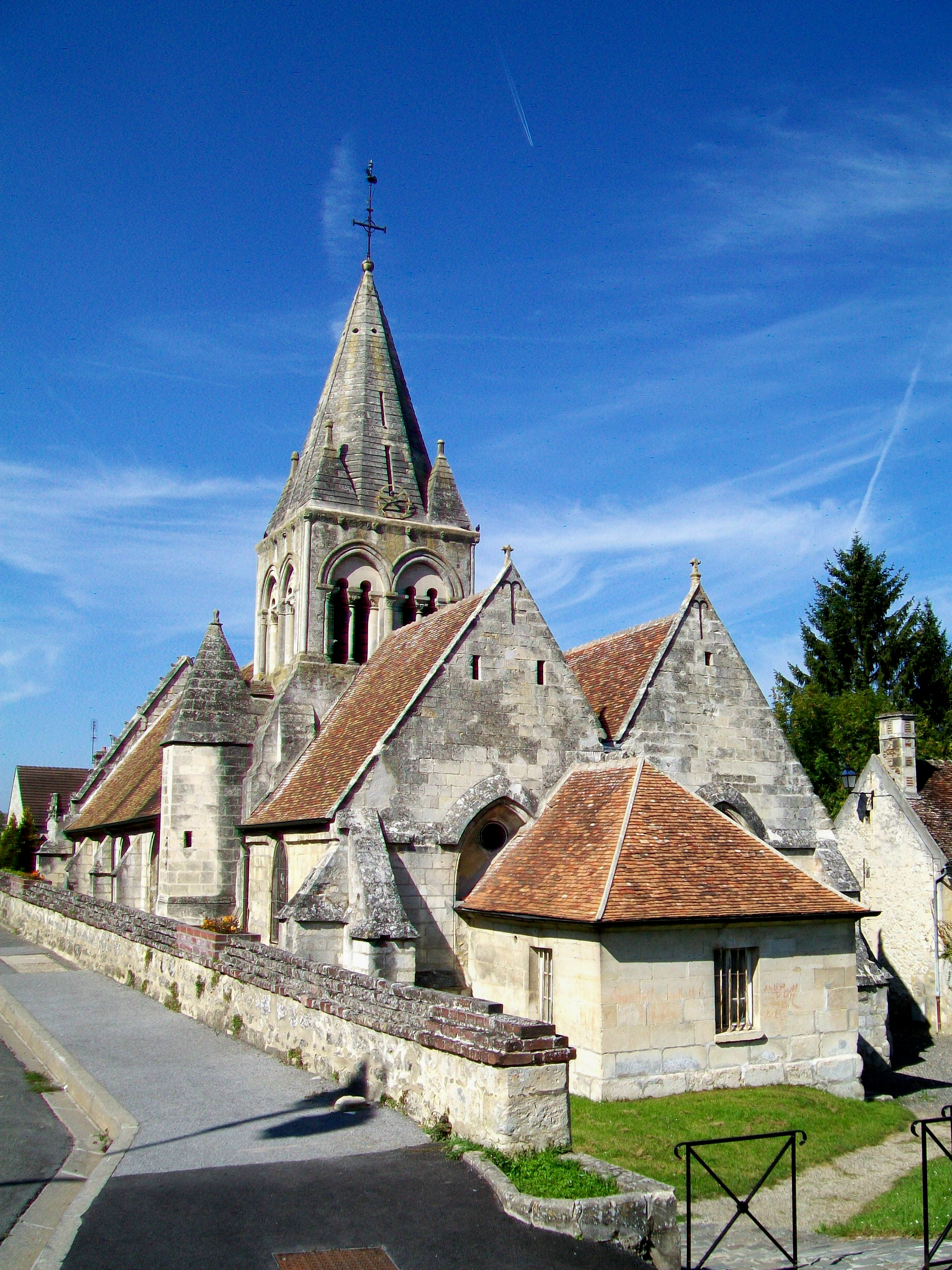 L'église Saint-Denis, Saint-Jean-Baptiste, depuis l'est.